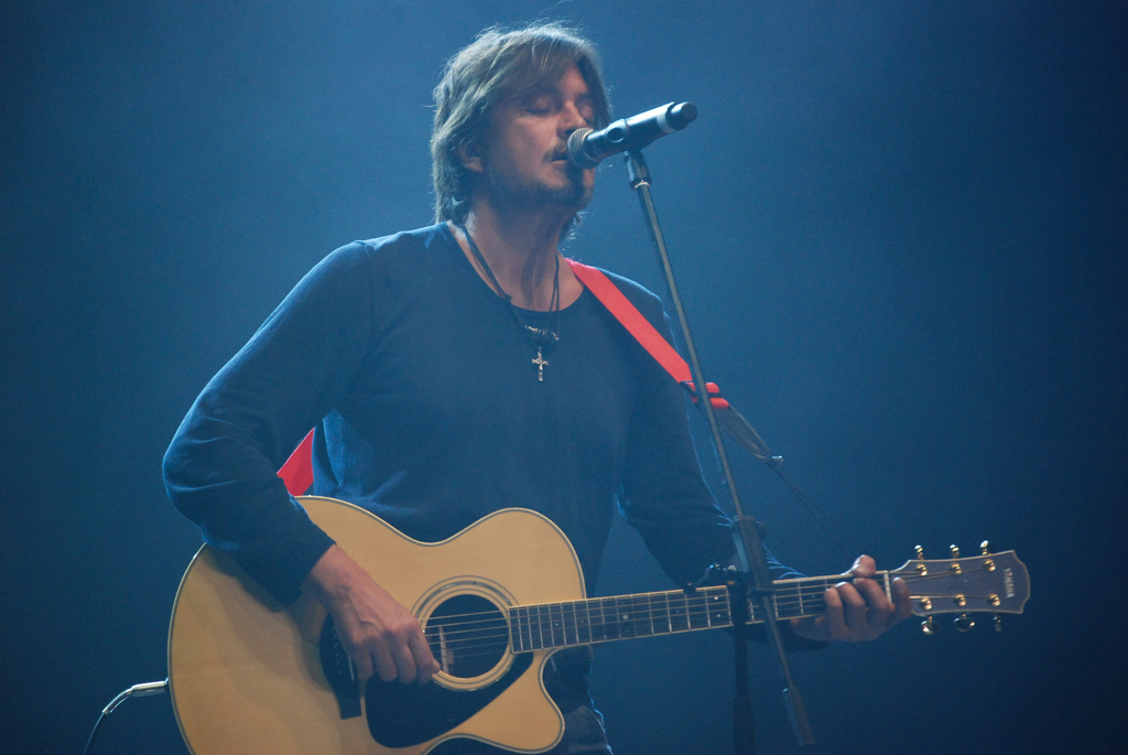 Cristiano De Andrè a Woodstock 5 Stelle